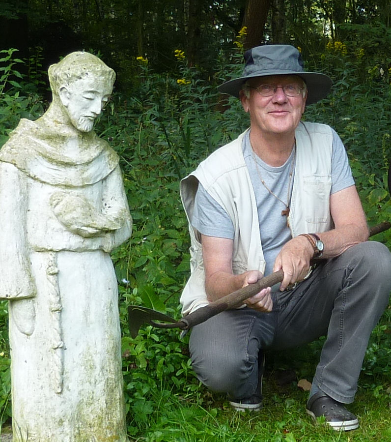 Rechts van het Franciscusbeeld in Stoutenburg, zien we de franciscaan Guy Dilweg, de stichter van het Franciscaans Milieuproject.